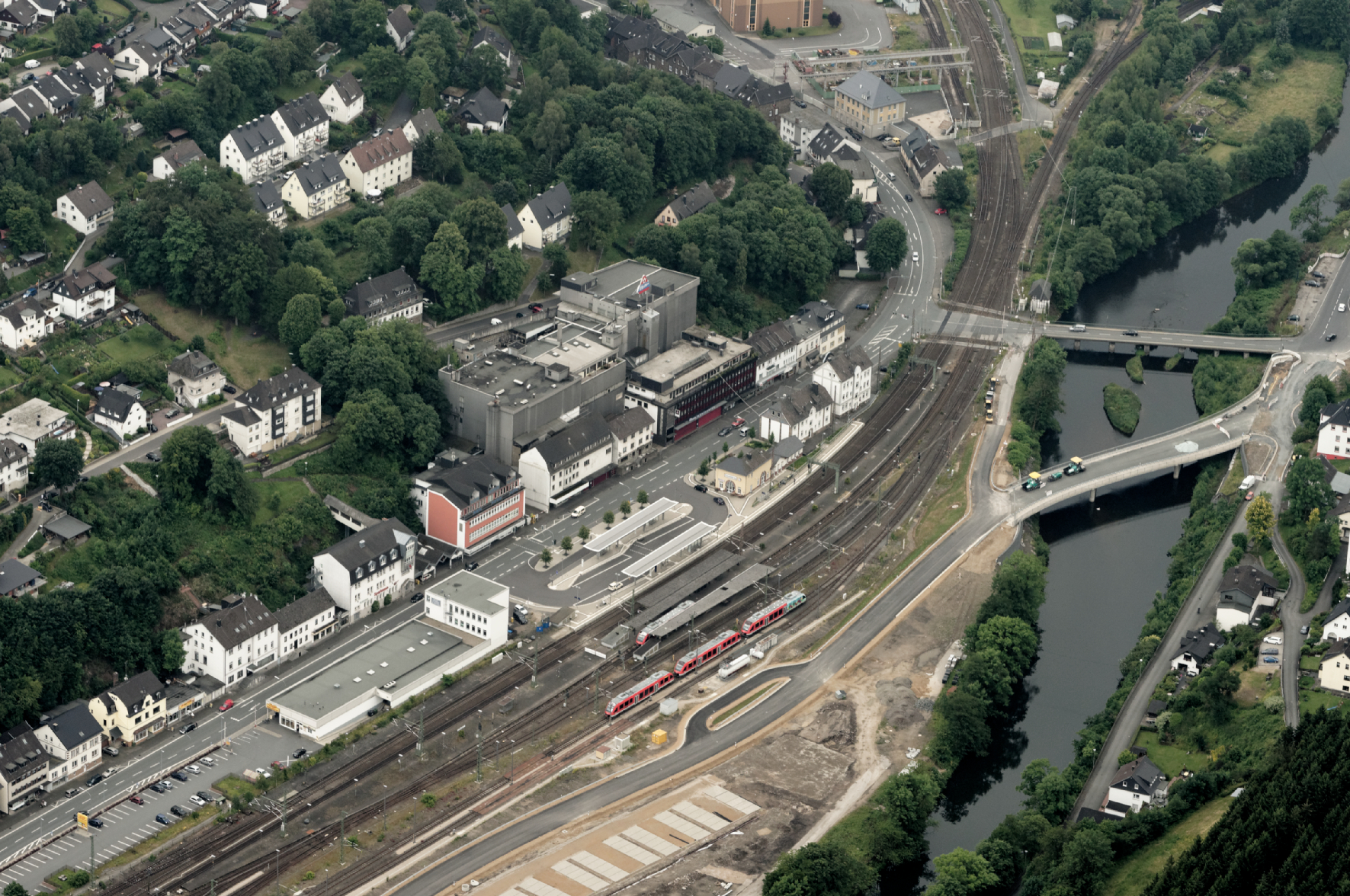 Fotoflug Sauerland Nord. Teilansicht Finnentrop mit Metten und Bahnhof. The making of this document was supported by the Community-Budget of Wikimedia Germany.